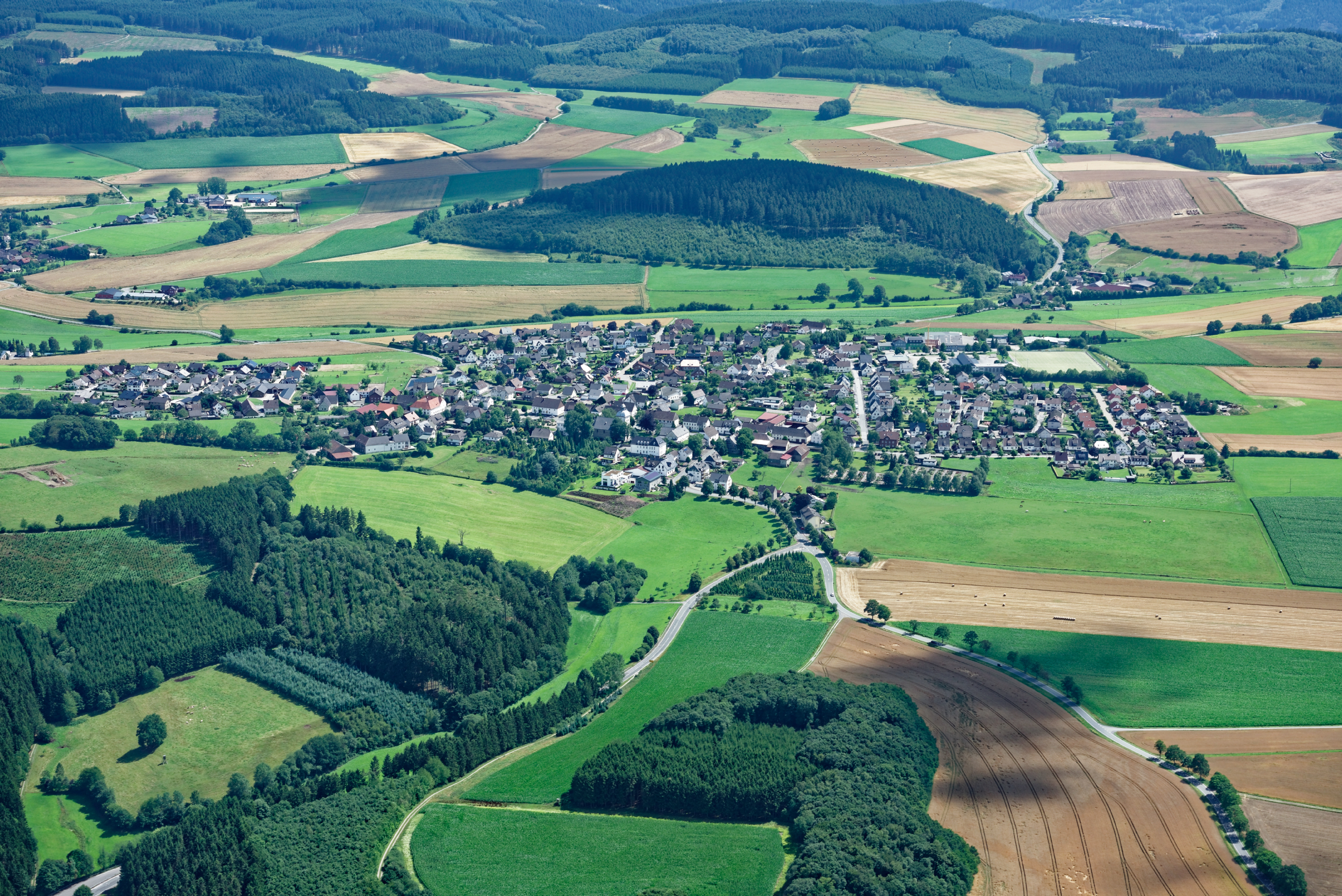 Fotoflug Sauerland West. Luftaufnahme: Affeln, Blick Richtung Südosten, Nordrhein-Westfalen.